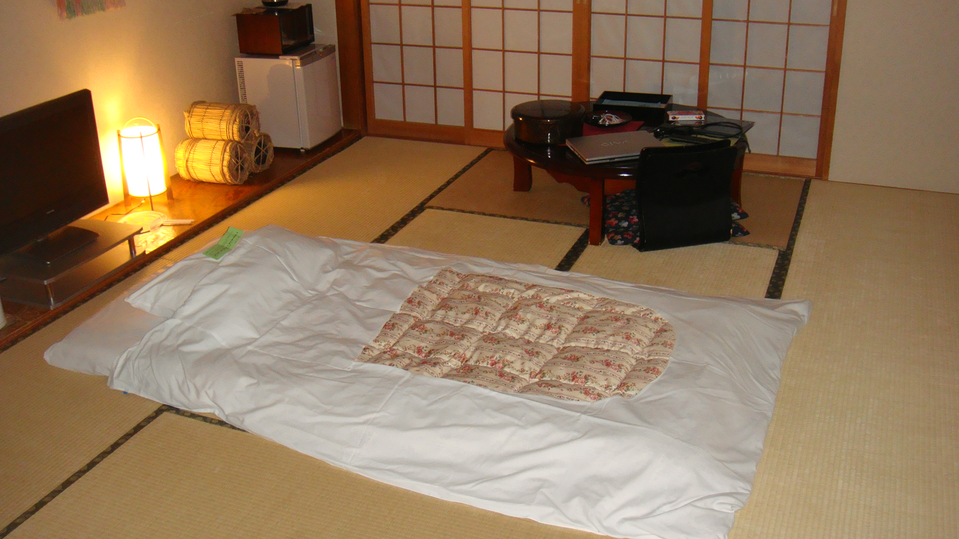 My room at Nukumori-no Yado Furukawa, in Jozankei, Hokkaido